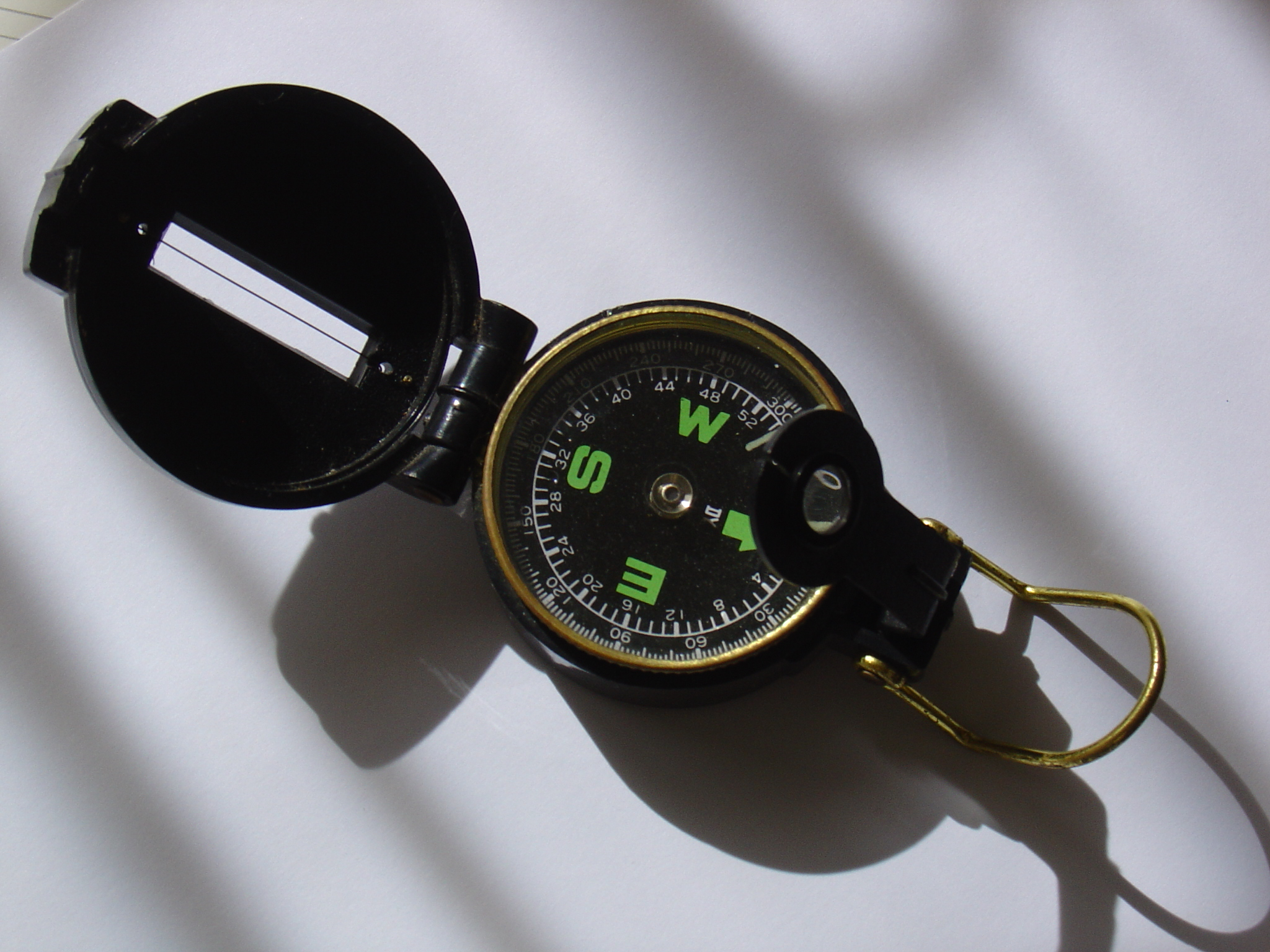 Brújula marinera